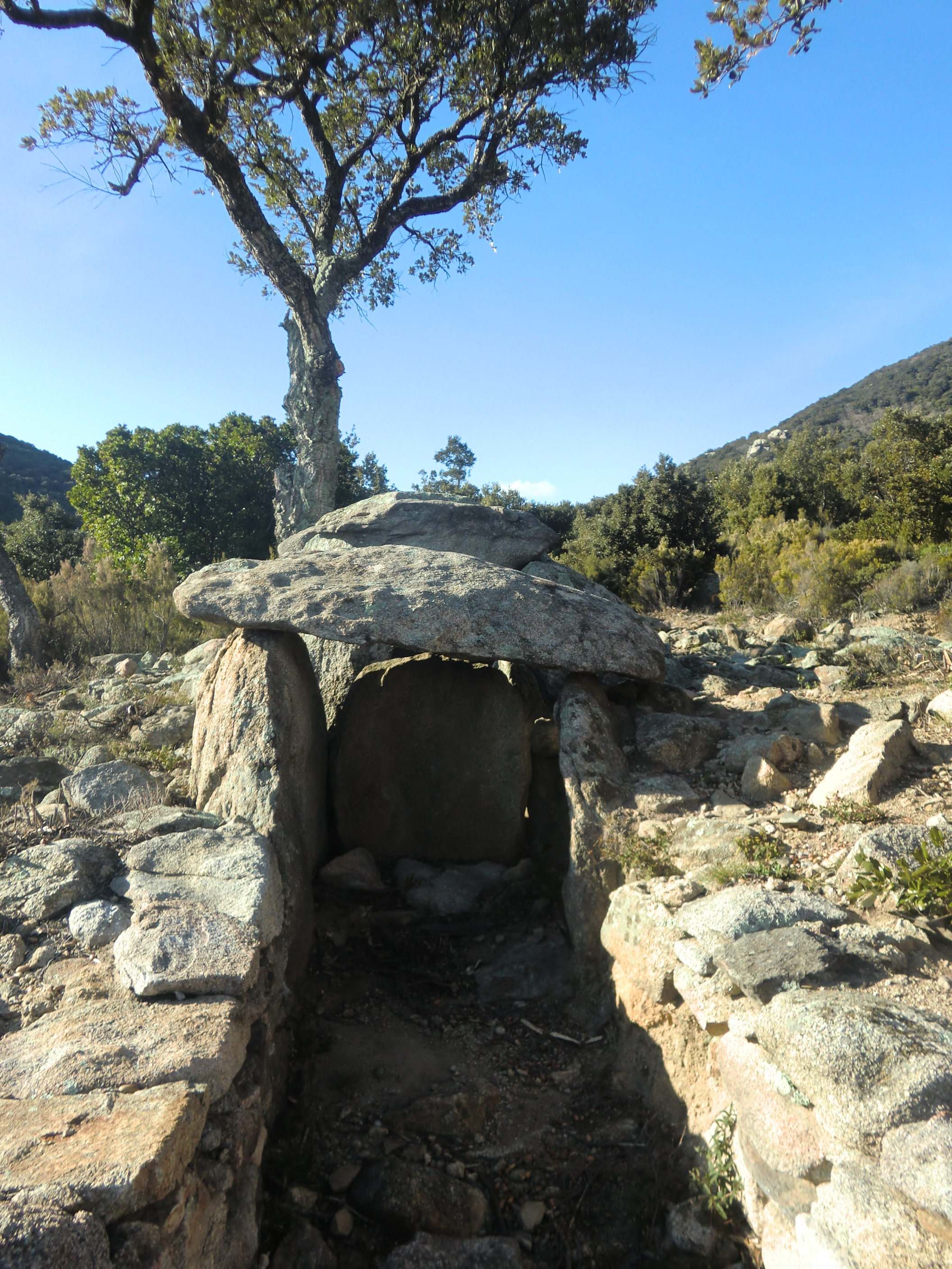 Dolmen de la Font del Roure al terme municipal d'Espolla, Alt Empordà.